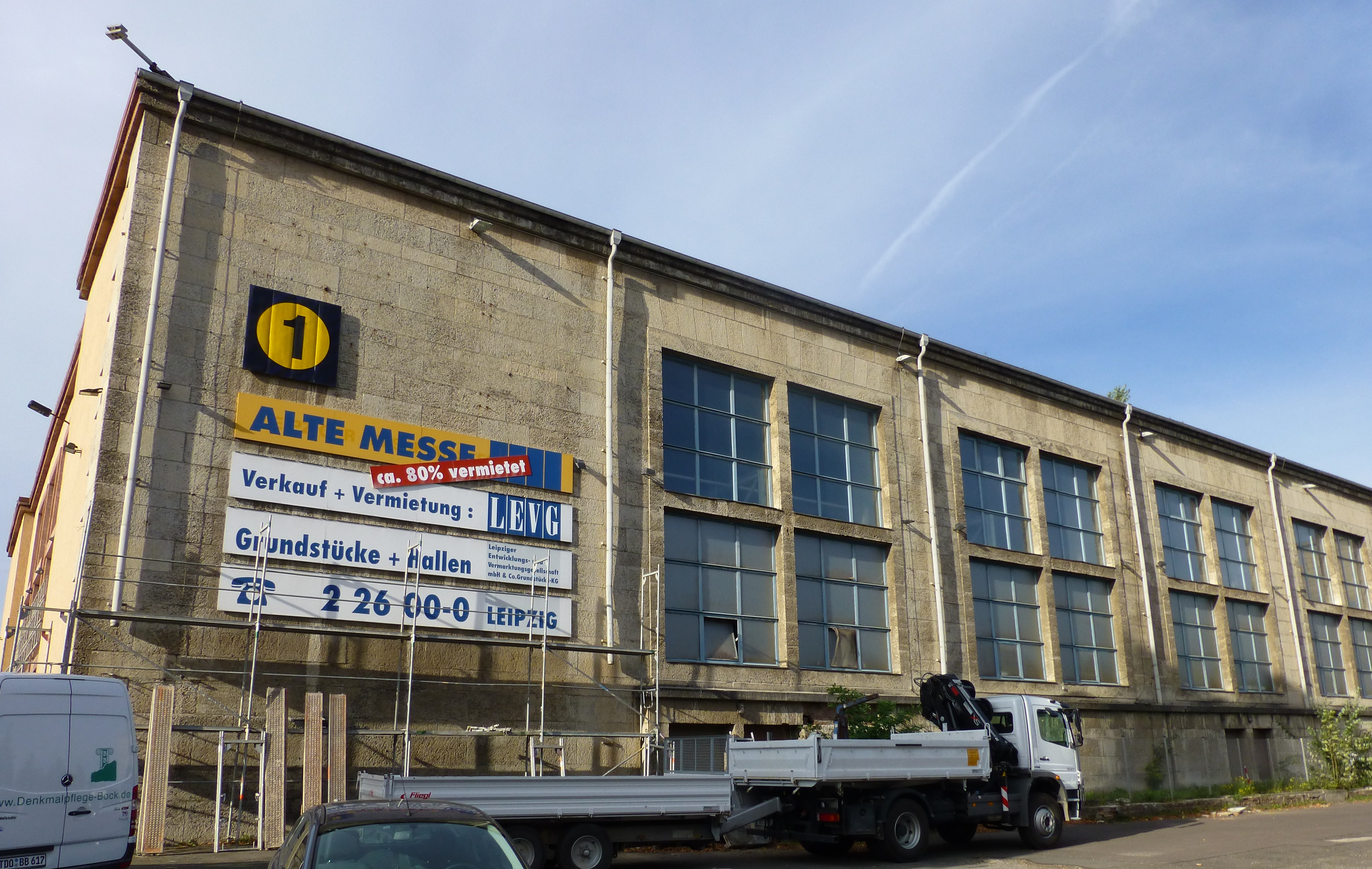 Alte Messe Leipzig